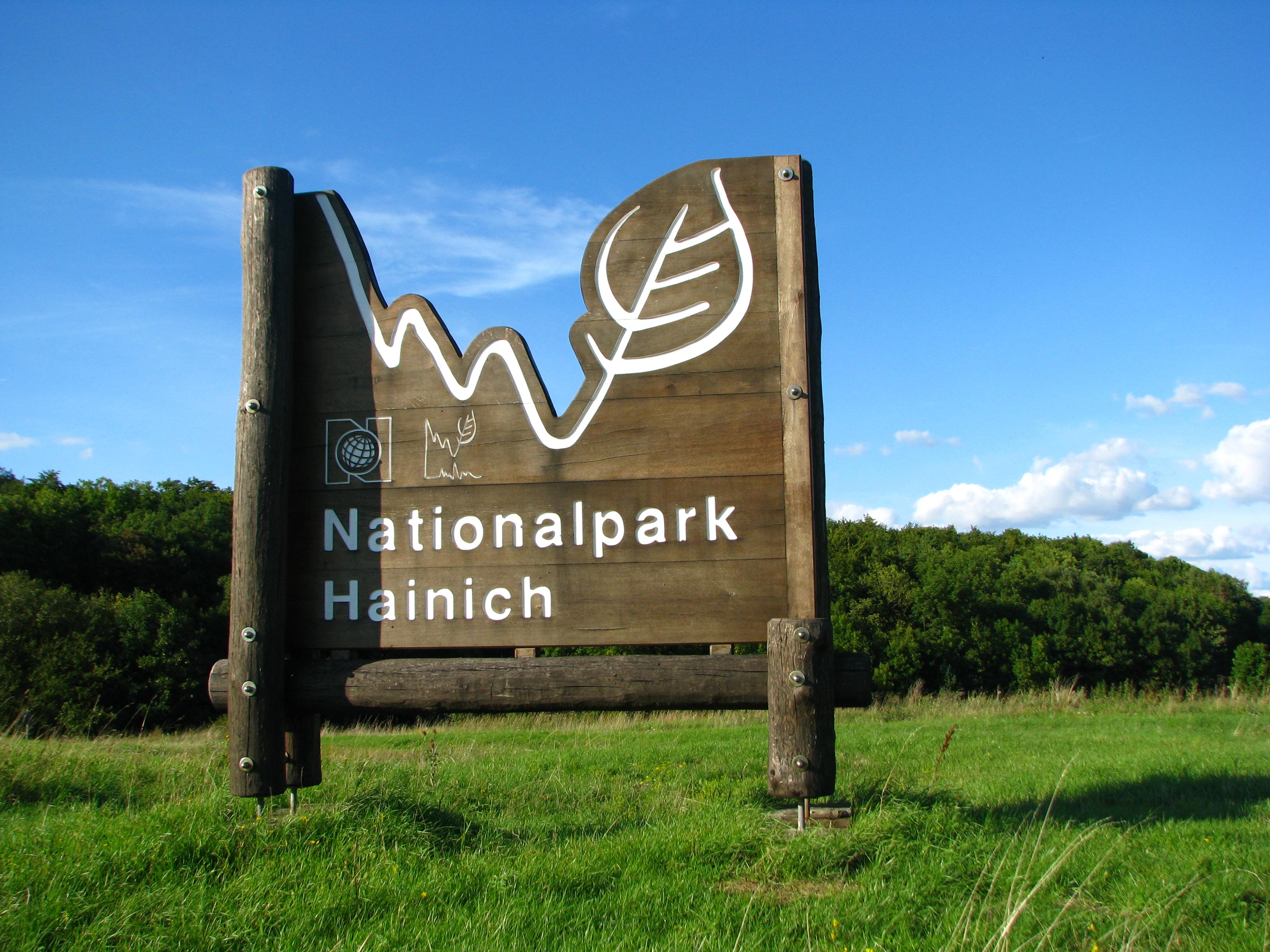 Schild am Eingang zum Nationalpark Hainich bei Craula.